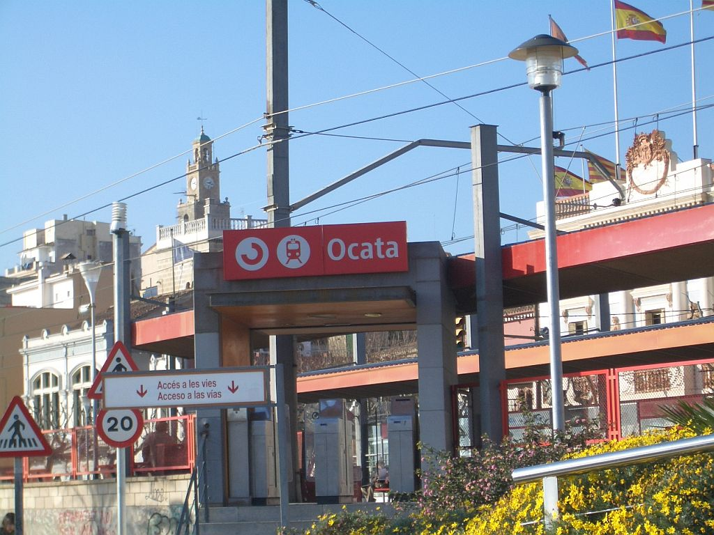 L'Església de Sant Pere, l'estació de tren i l'Ajuntament del Masnou El Masnou, Sant Esteve 2007